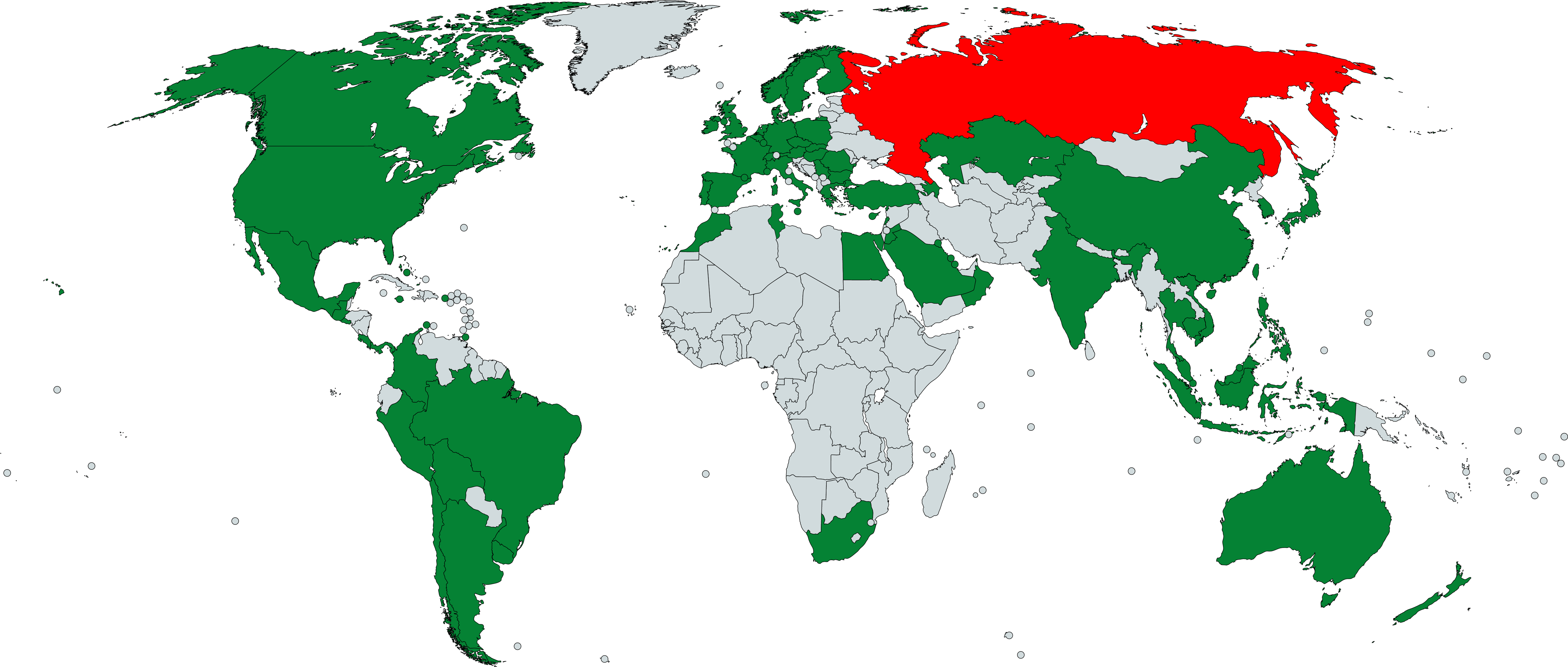 Countries and territories that have a Starbucks Coffee as of June 26th June, 2019.